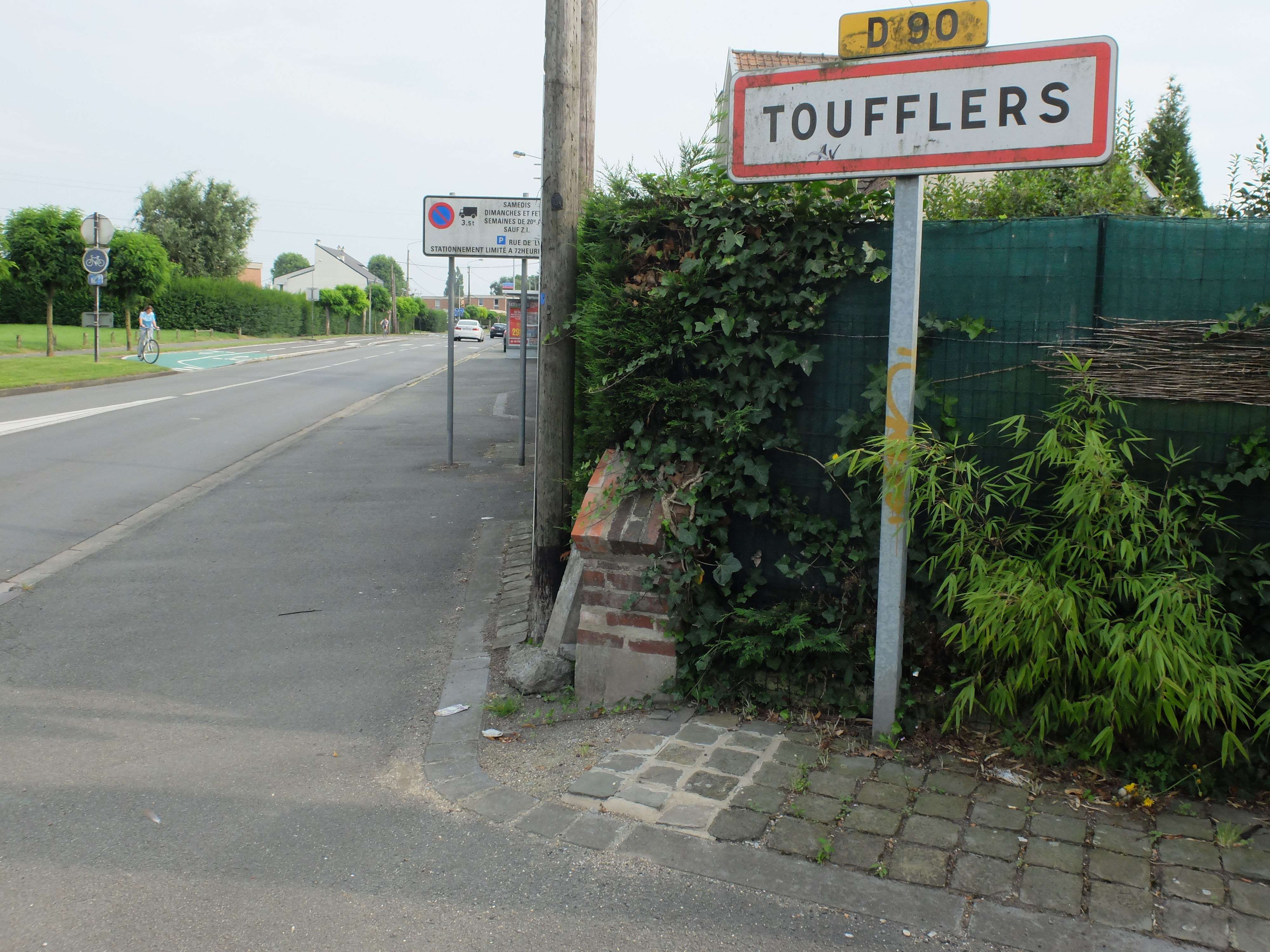 Vue d'une entrée de la commune de Toufflers.